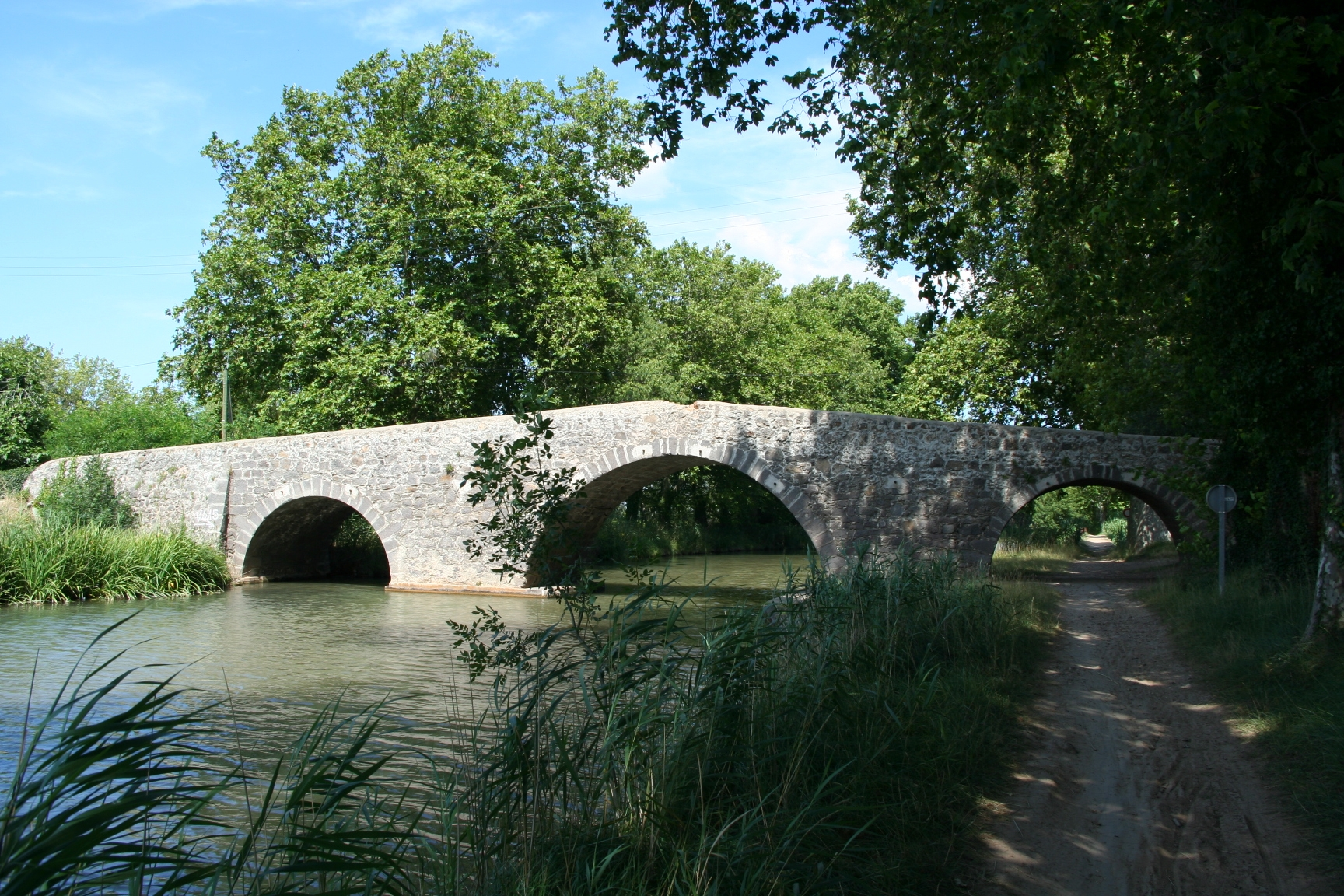 Pont Saint-Joseph sur le canal du Midi (MH) à Agde (Hérault, France)